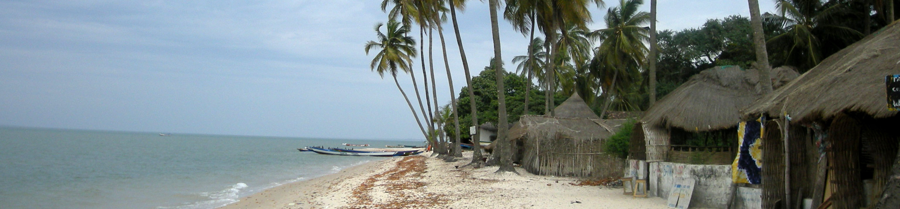 La plage de Carabane (Casamance, Sénégal)